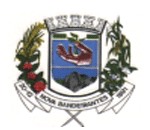 Brasão_Nova_Bandeirantes_MT.gif